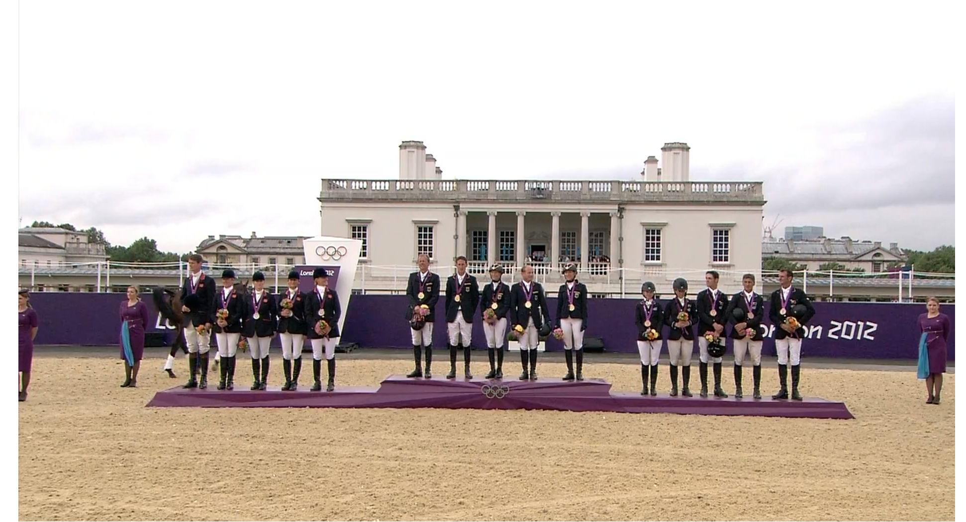 Siegerehrung London 2012 Reiten: Vielseitigkeit Mannschaft